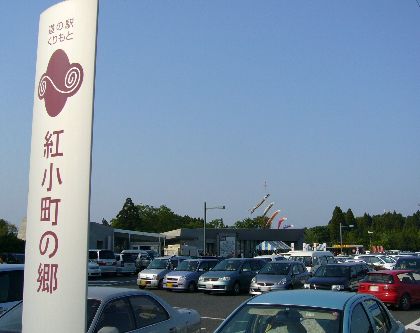 kurimoto-rest-station,katori-city,japan